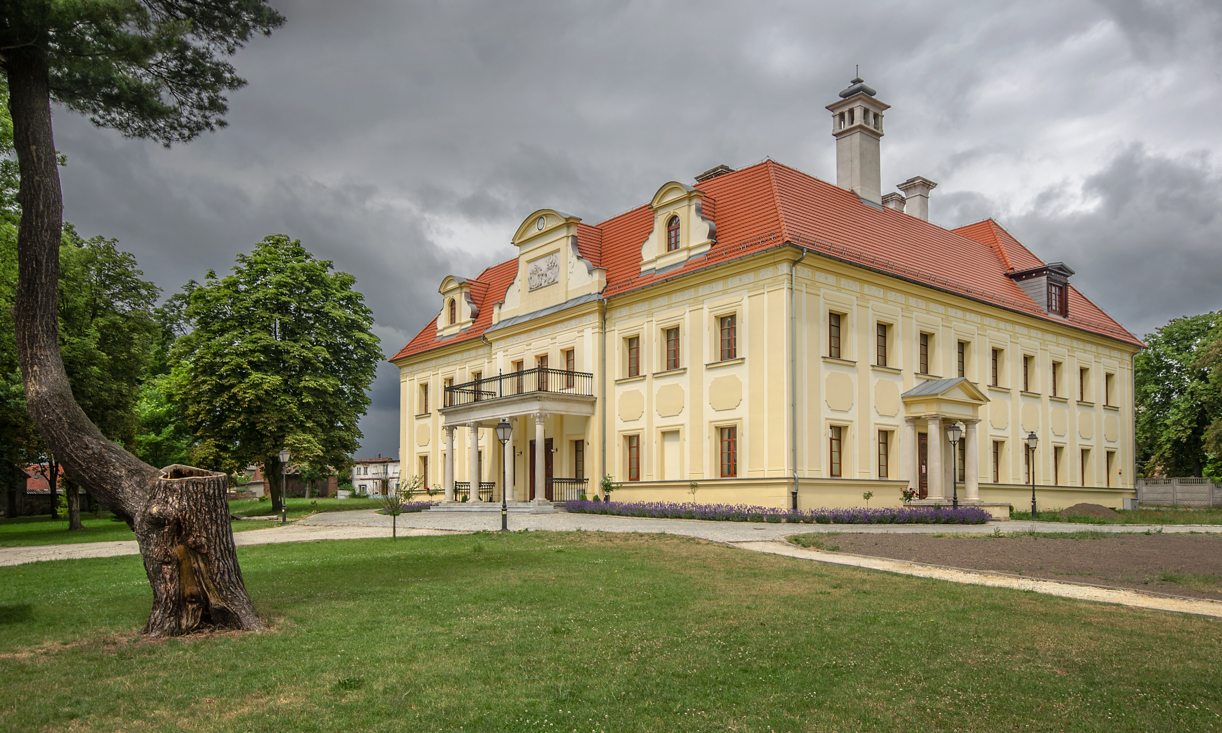 Gaworzyce, pałac, XVII, XVIII, XIX